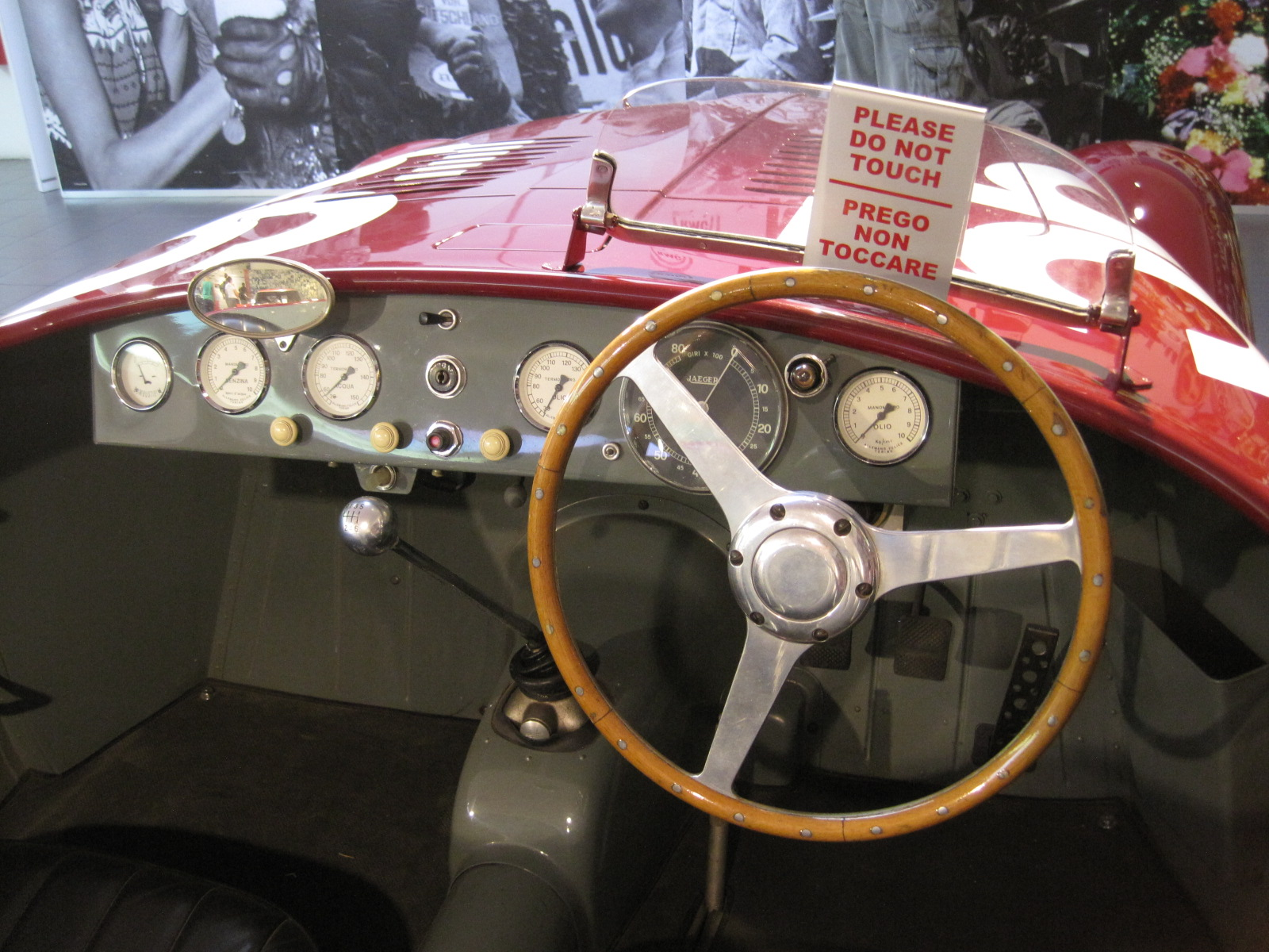 Collections of the Galleria Ferrari